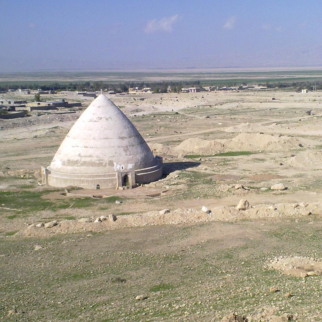 آب انبار شرقی روستای چاه کور